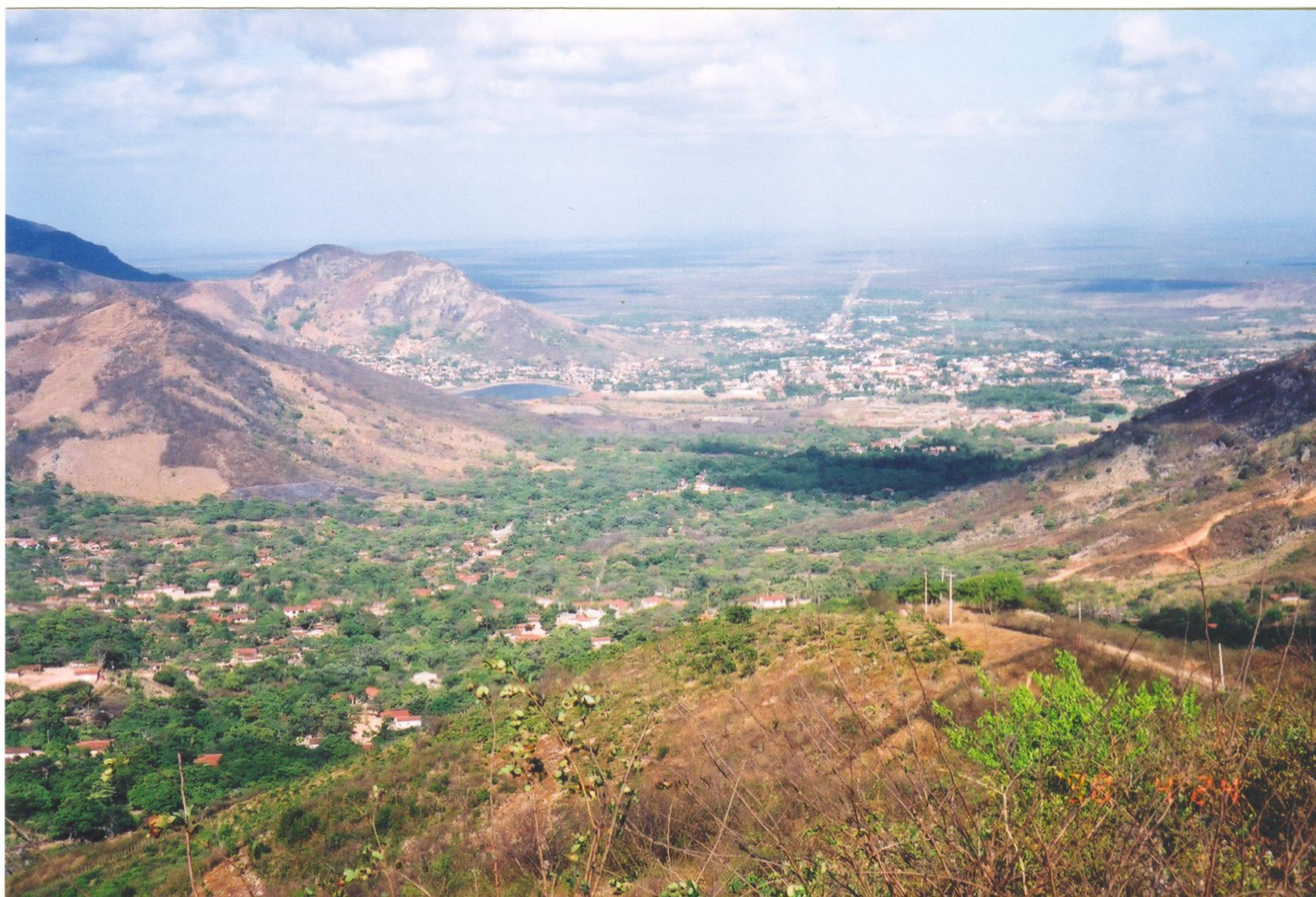 bairro picos Itapipoca, Ceará